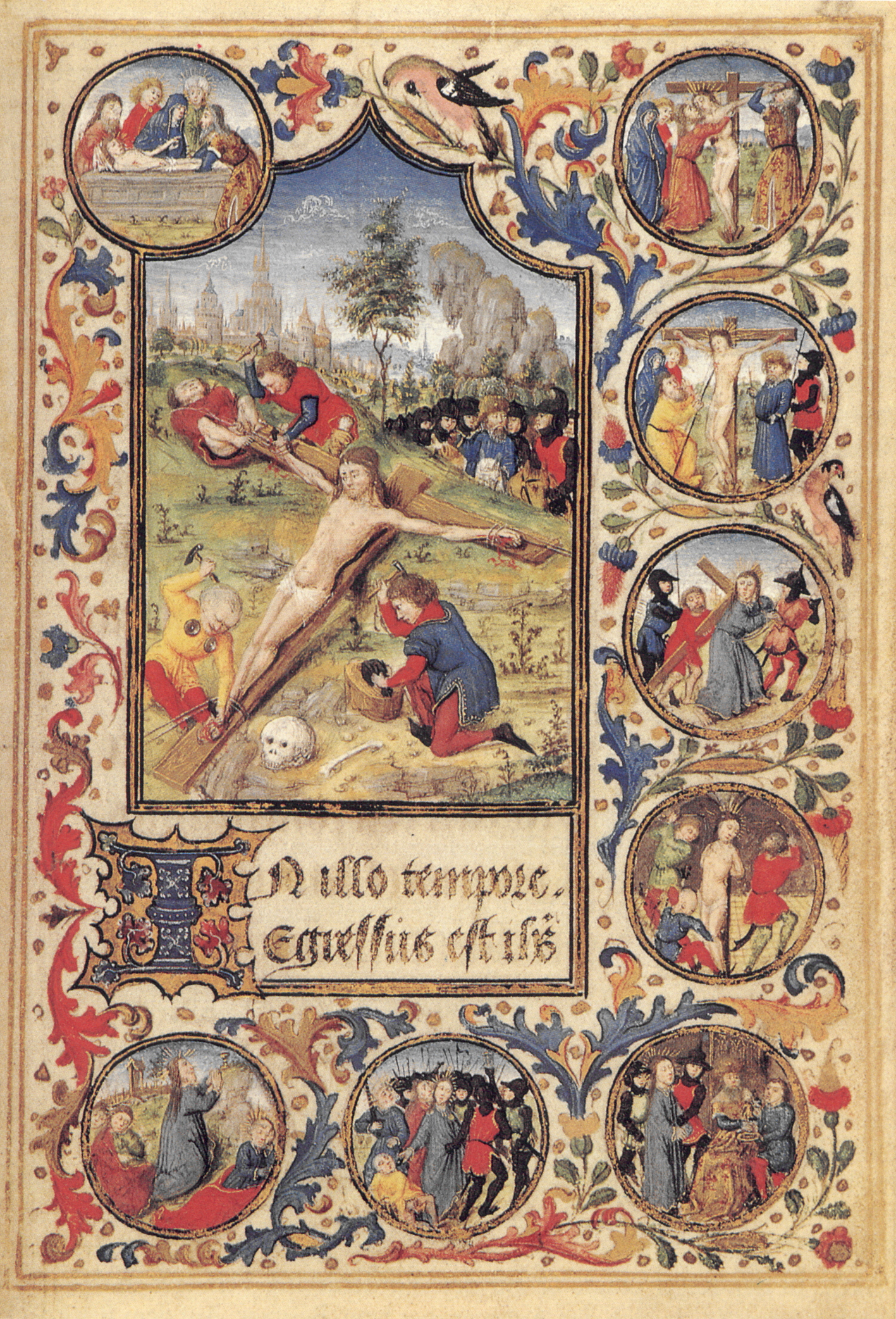 Kreuzannagelung; fol. 26r aus dem Sachsenheimgebetbuch (Lat. Stundenbuch), Pergamenthandschrift, 173 Bl., 14,5 x 10 cm, Gent oder Brügge, um 1460 Württembergische Landesbibliothek Stuttgart, Cod. brev. 162 (bought in 1960 from the Dyson Perrins collection auction) Digitalisat der WLB